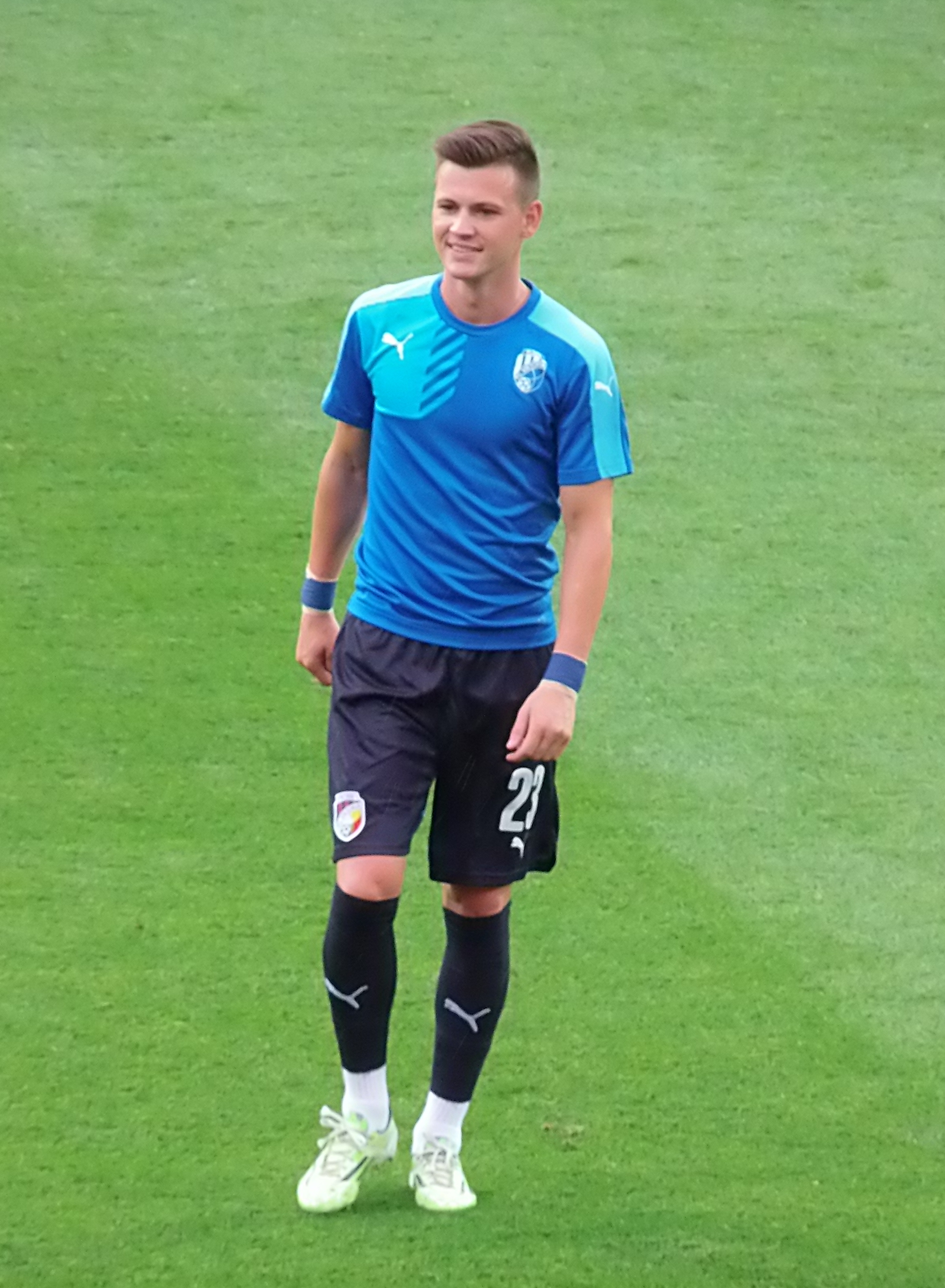 Egon Vůch na tréninku před českým Superpohárem 2015